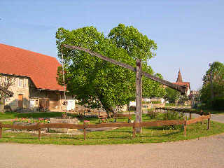 Village de Croix (Territoire de Belfort], centre du village et puits à balancier. Photo prise en mai 2004 par LP90 Licence GFDL LP90 mai 2004